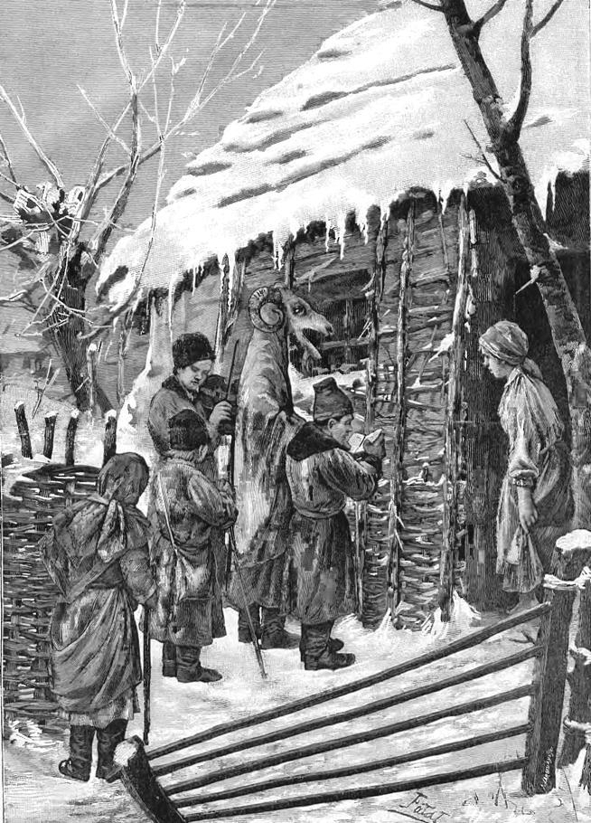 Polska. Kolędy. Chodzenie z turoniem.